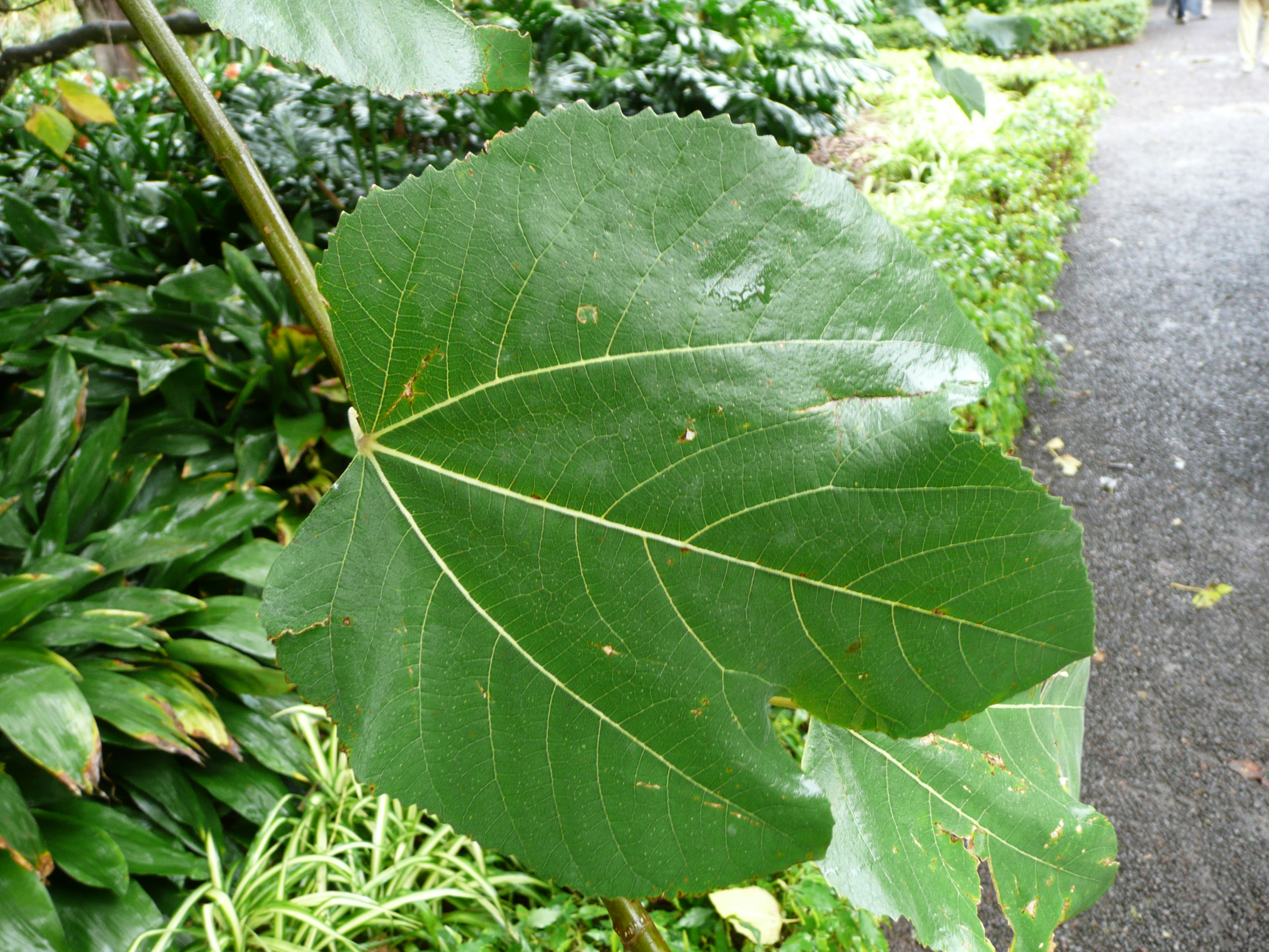 Ficus palmata in Jardín de Aclimatación de la Orotava Map: 28° 24' 39" N, 16° 32' 7" W